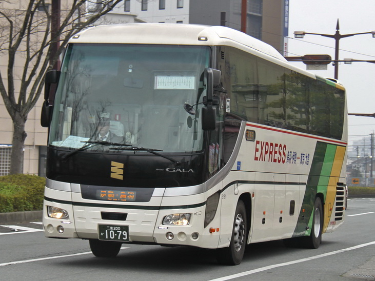 三重交通鸟羽大宫线五十铃GALA